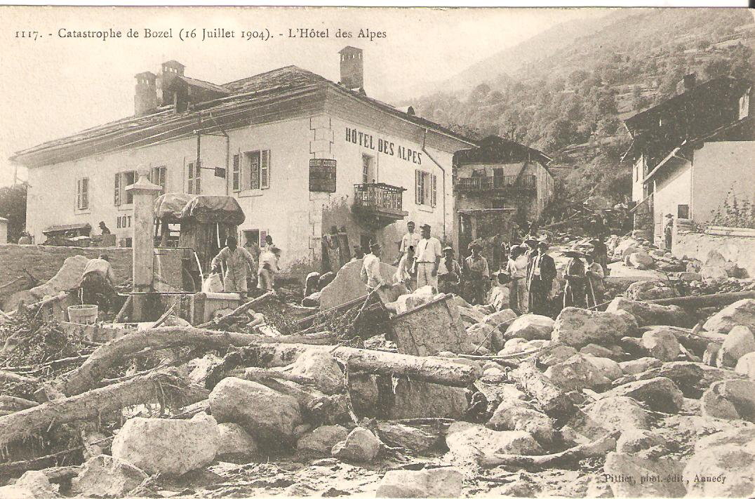 carte postale scannée